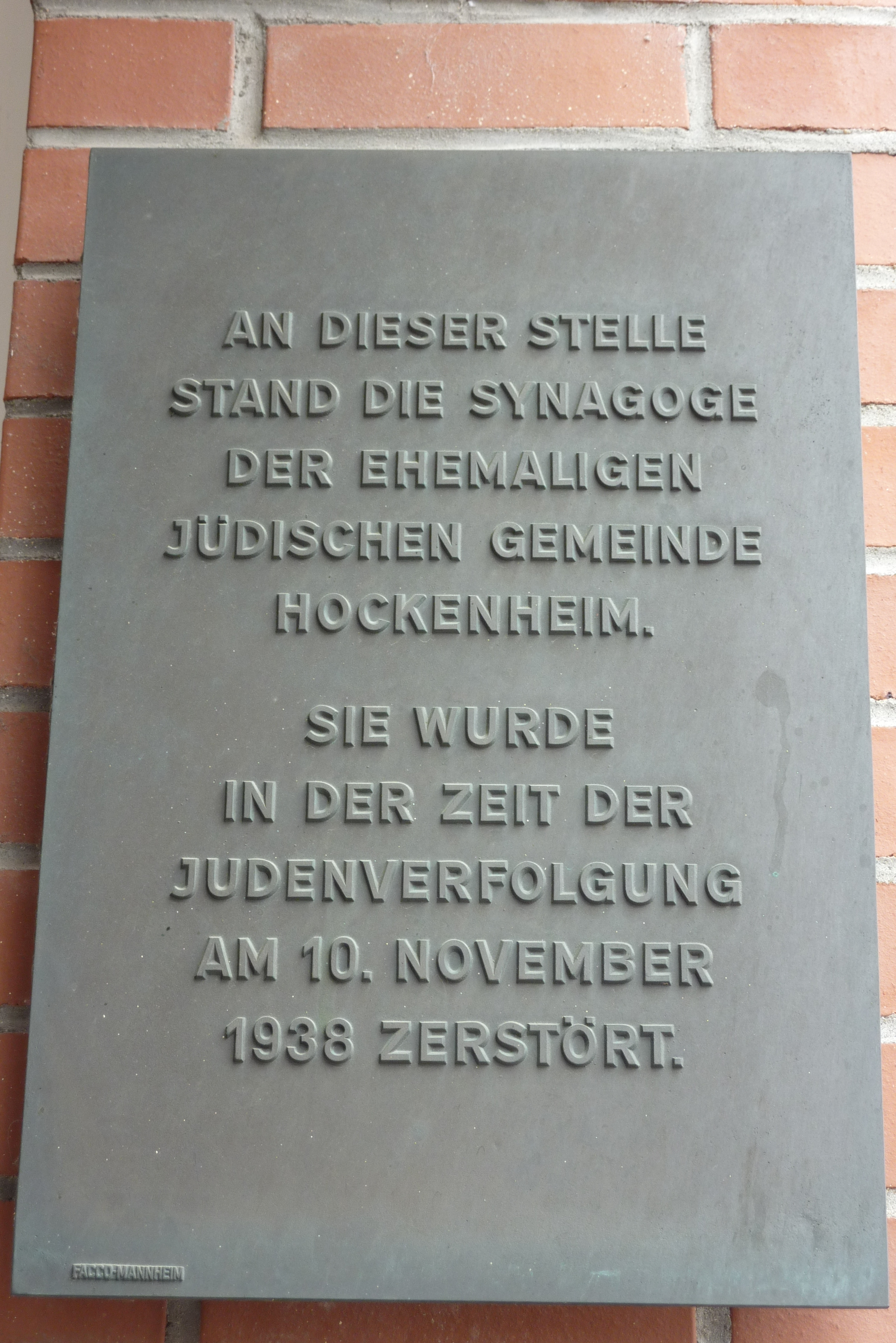 Gedenktafel an die Synagoge in Hockenheim im Rhein-Neckar-Kreis am Erweiterungsbau des Rathauses